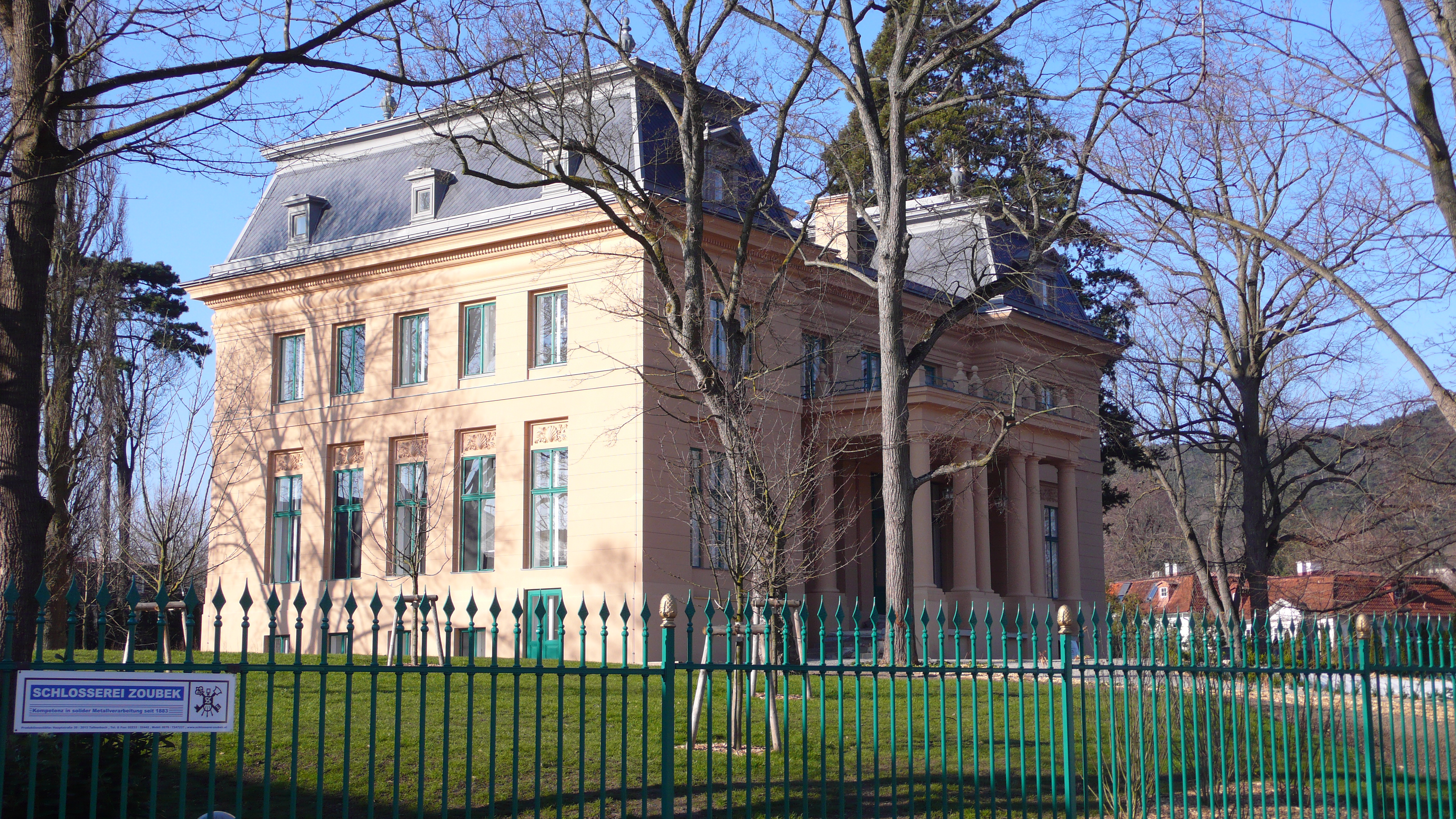 Villa Hahn, Seitenansicht